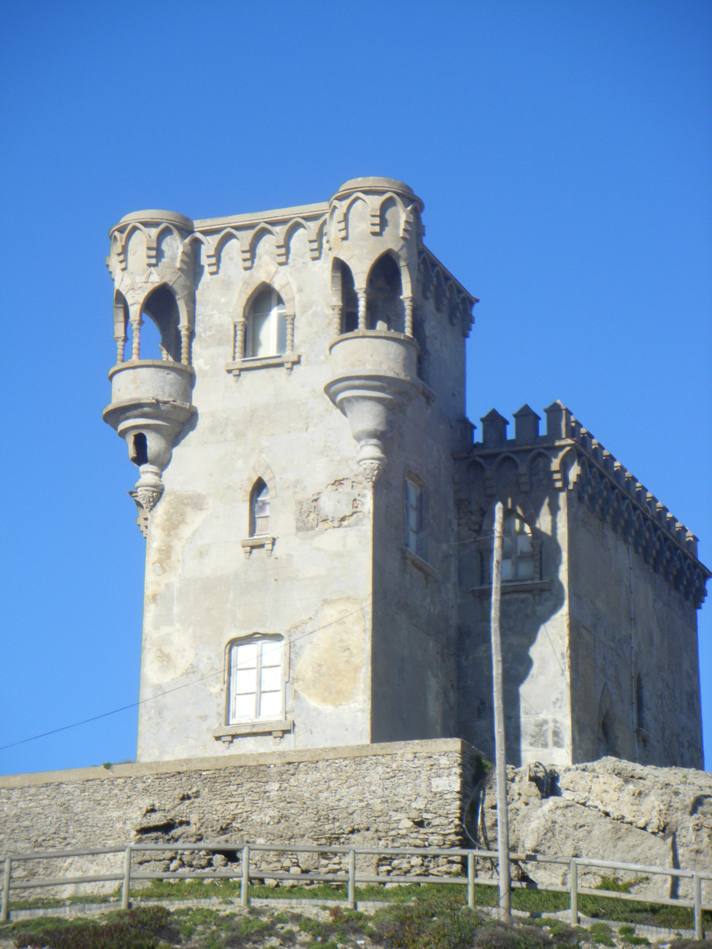 Castillo de Santa Catalina, situado sobre un promontorio vigilando la unión del mar mediterraneo y el oceano atlantico, con vista de Africa.